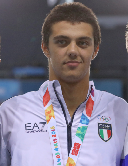 Thomas Ceccon, nuotatore - Olimpiadi Giovanili 2018